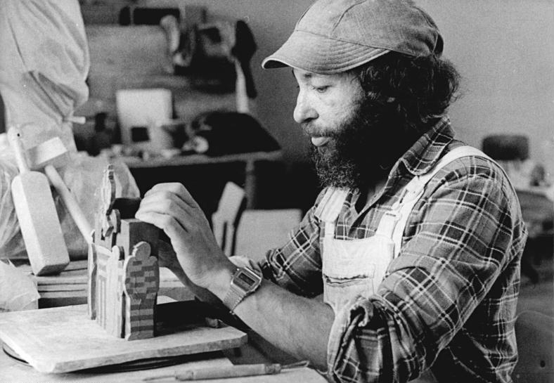 Zum Beitrag: Janz Berlin in eenem Koffa - Lustige Figuren, Reliefe und Kacheln fürs Jubiläum ADN-ZB Weisflog 6.2.1987 Christian Uhlig, seines Zeichens Formgestalter und Grafiker, im Atelier der Keramischen Werkstätten Bad Liebenwerda beim Modellieren einer kleinen Plastik. Solche collageähnlichen Plastiken sowie lustige Figuren und Pfeifgefäße aus Ton fertigte der Künstler im Auftrag des Staatlichen Kunsthandels fürs Berlin-Jubiläum.